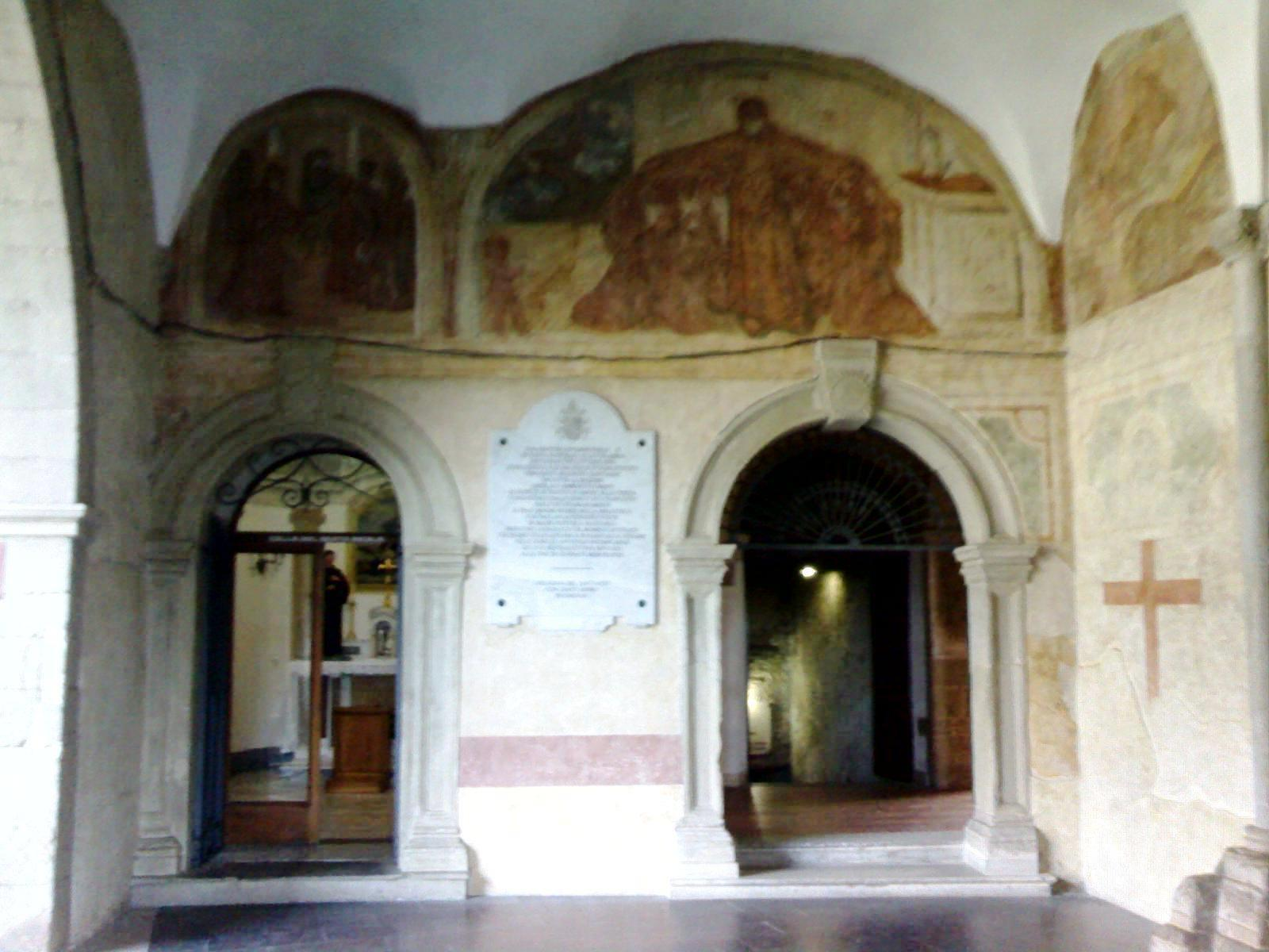 Pronao aperto della basilica antica di San Francesco a Paola (CS)